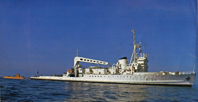 Der ehemalige Seeflugzeugtender Greif der deutschen Luftwaffe als französisches Hilfsschiff Marcel Le Bihan assistiert dem Tieftauchboot Archimède